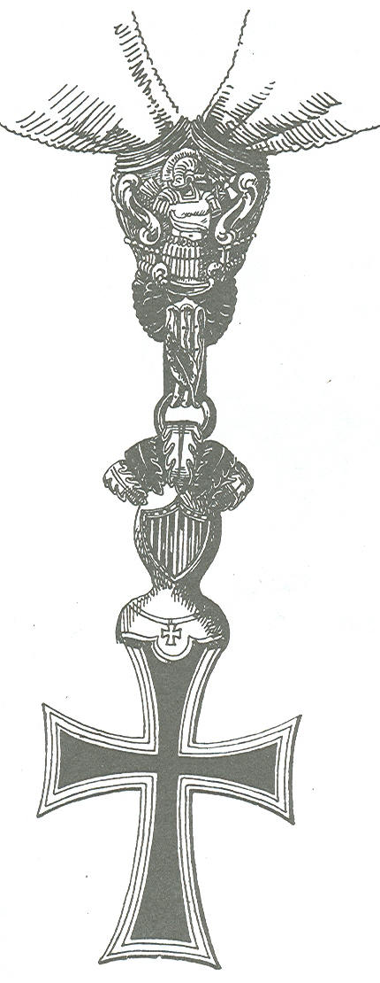 Duitse Orde. Uit een boek dat in 1893 in Leipzig werd gedrukt. Maximilian Gritzner Handbuch de Ritter - und Verdienstorden. Scan van Blz. 55 van het boek "Handbuch der Ritter- und Verdienstorden " uitgegeven 1893 tekening van de in 1902 overleden Maximilian Gritzner. Robert Prummel 10 jul 2008 16:40 (CEST) Het copyright is verlopen.